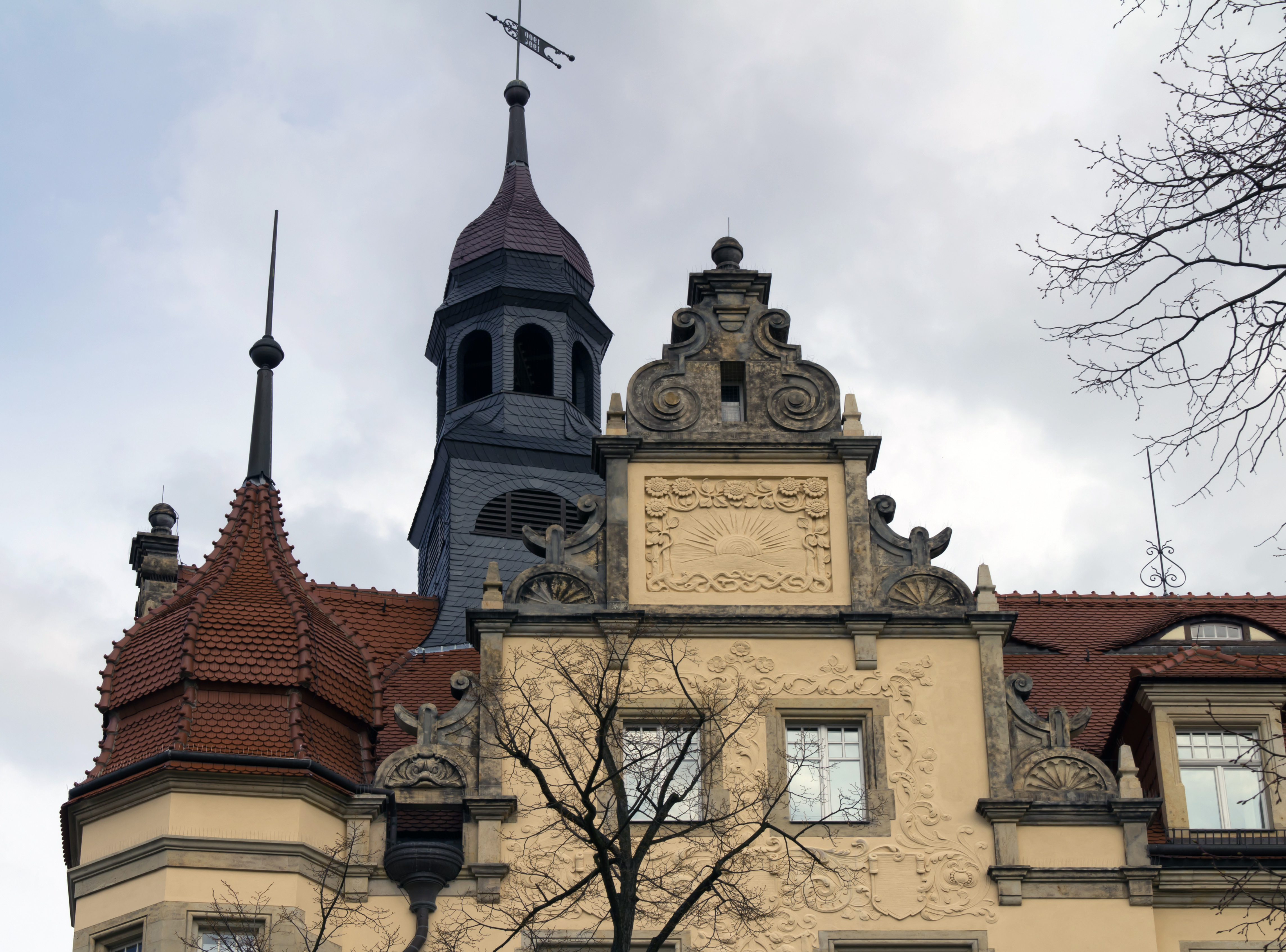 Rathaus Leuben, Dresden (Rathaus Leuben)